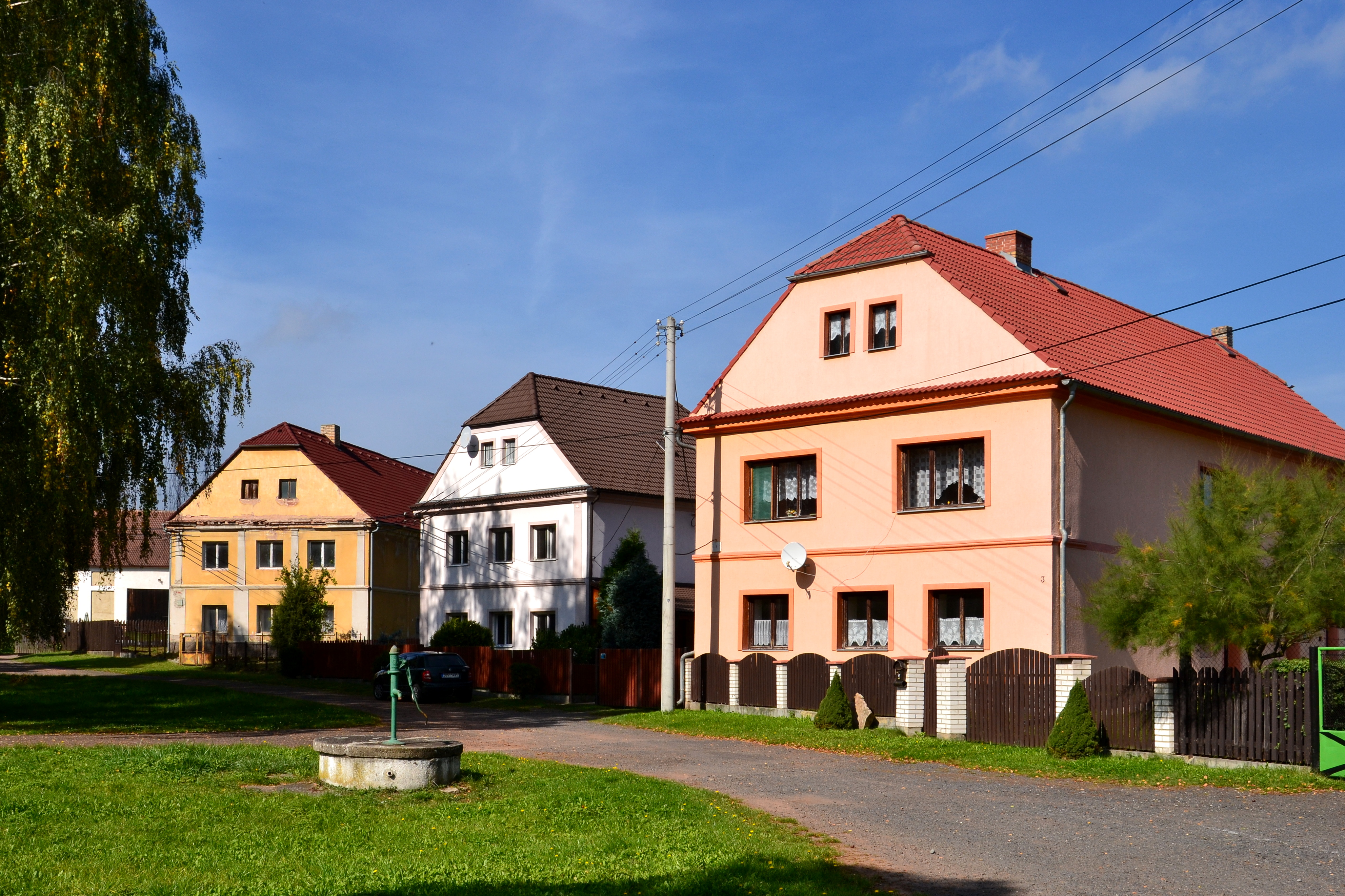 Vrbička - domy na návsi